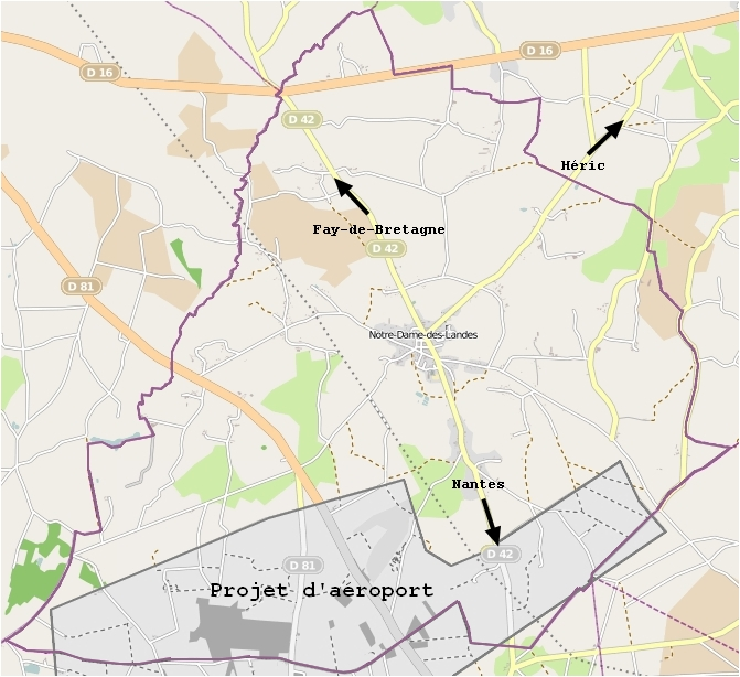 Commune de Notre-Dame-des-Landes sur OpenStreetMap